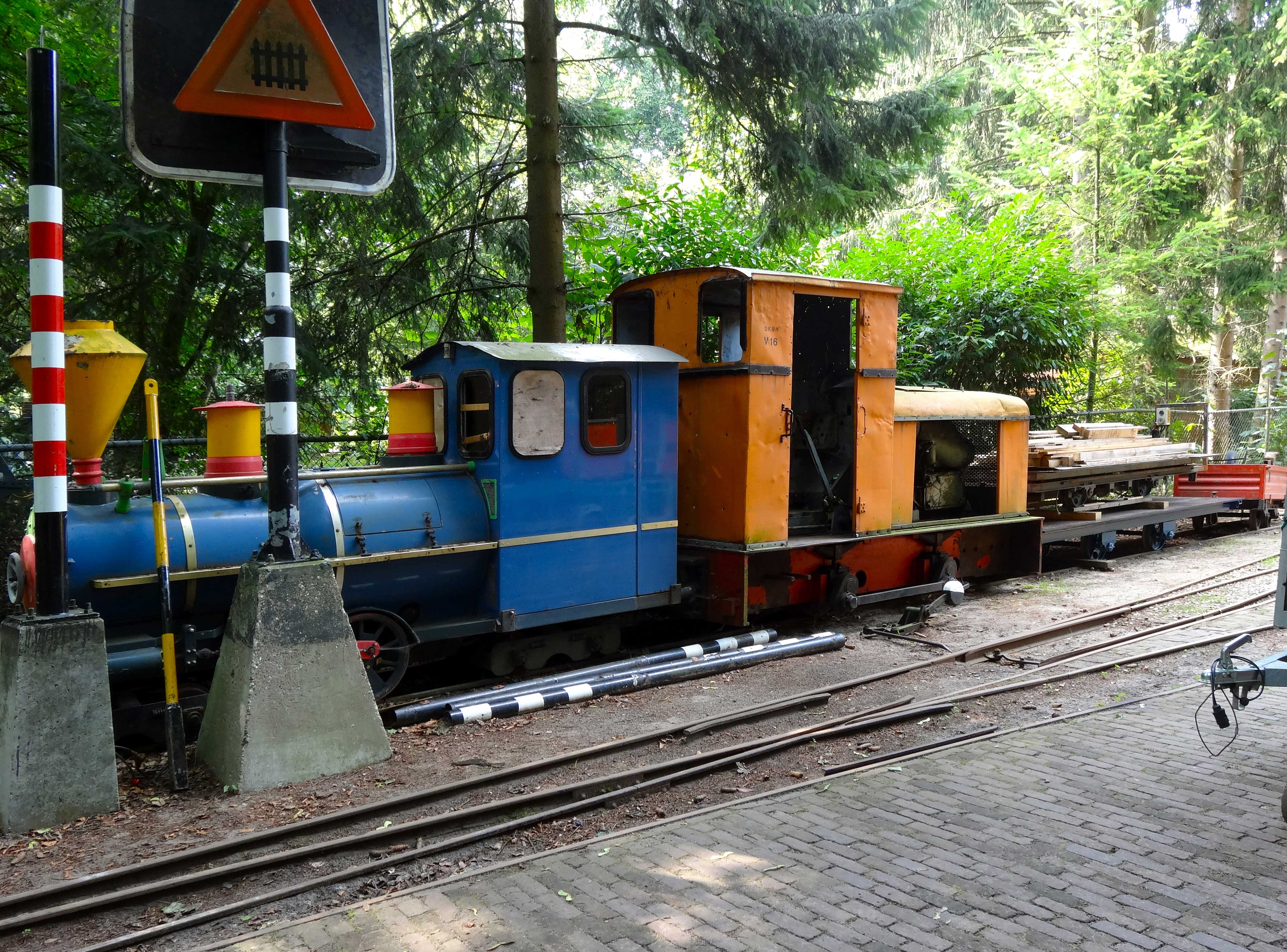 Remise van Rijssens Leemspoor